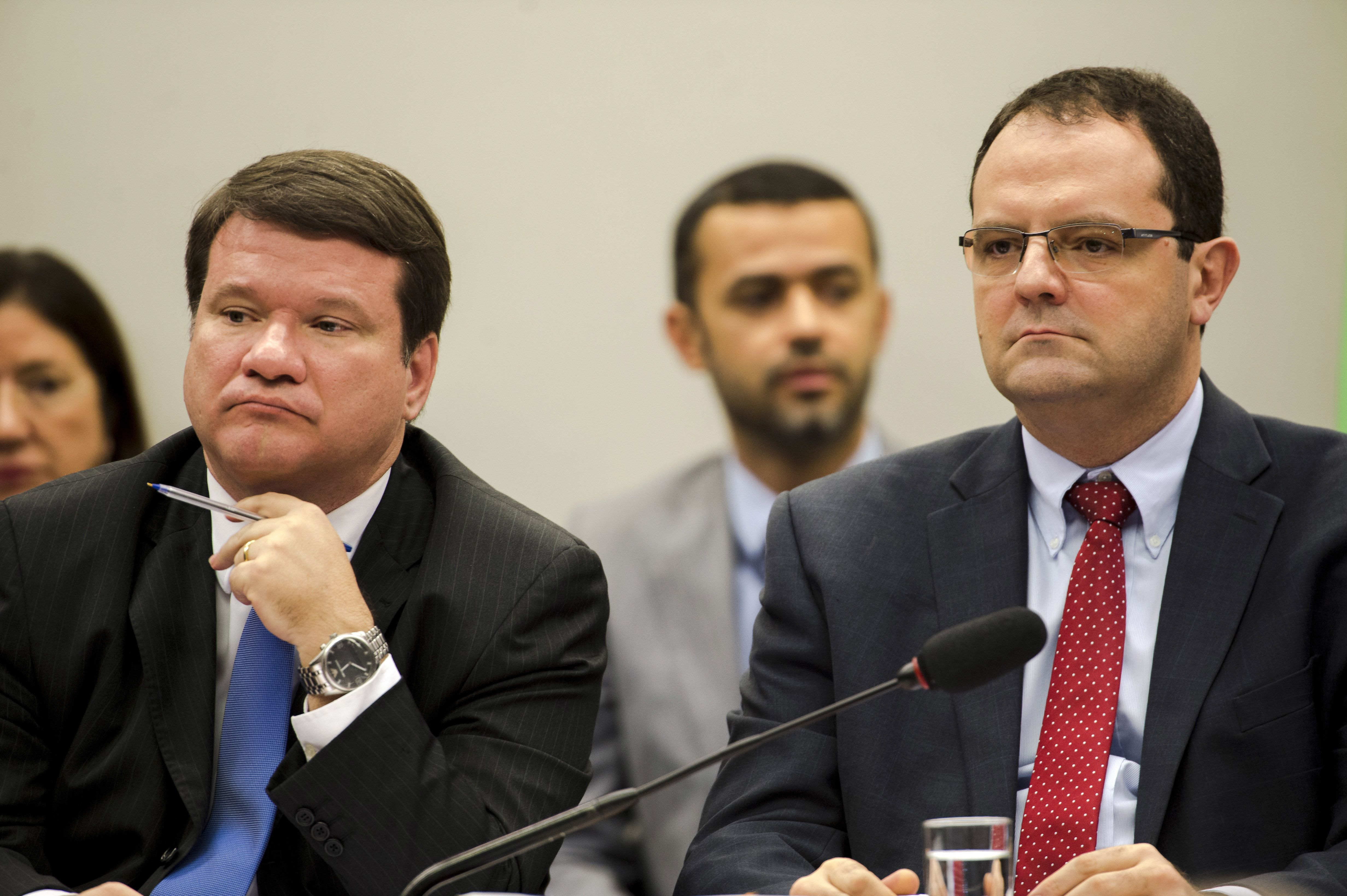 O ministro da Fazenda Nelson Barbosa e o professor de Direito Tributário da Universidade do Estado do Rio de Janeiro Ricardo Lodi apresentam a defesa da presidente Dilma Rousseff na Comissão Especial do Impeachment.